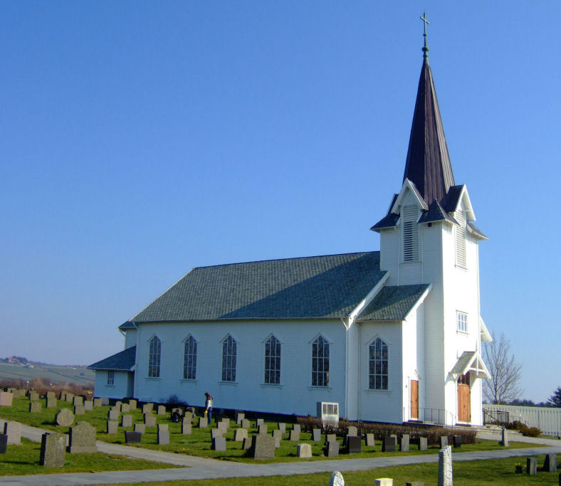 Varhaug kirke, Hå, Rogaland Norway